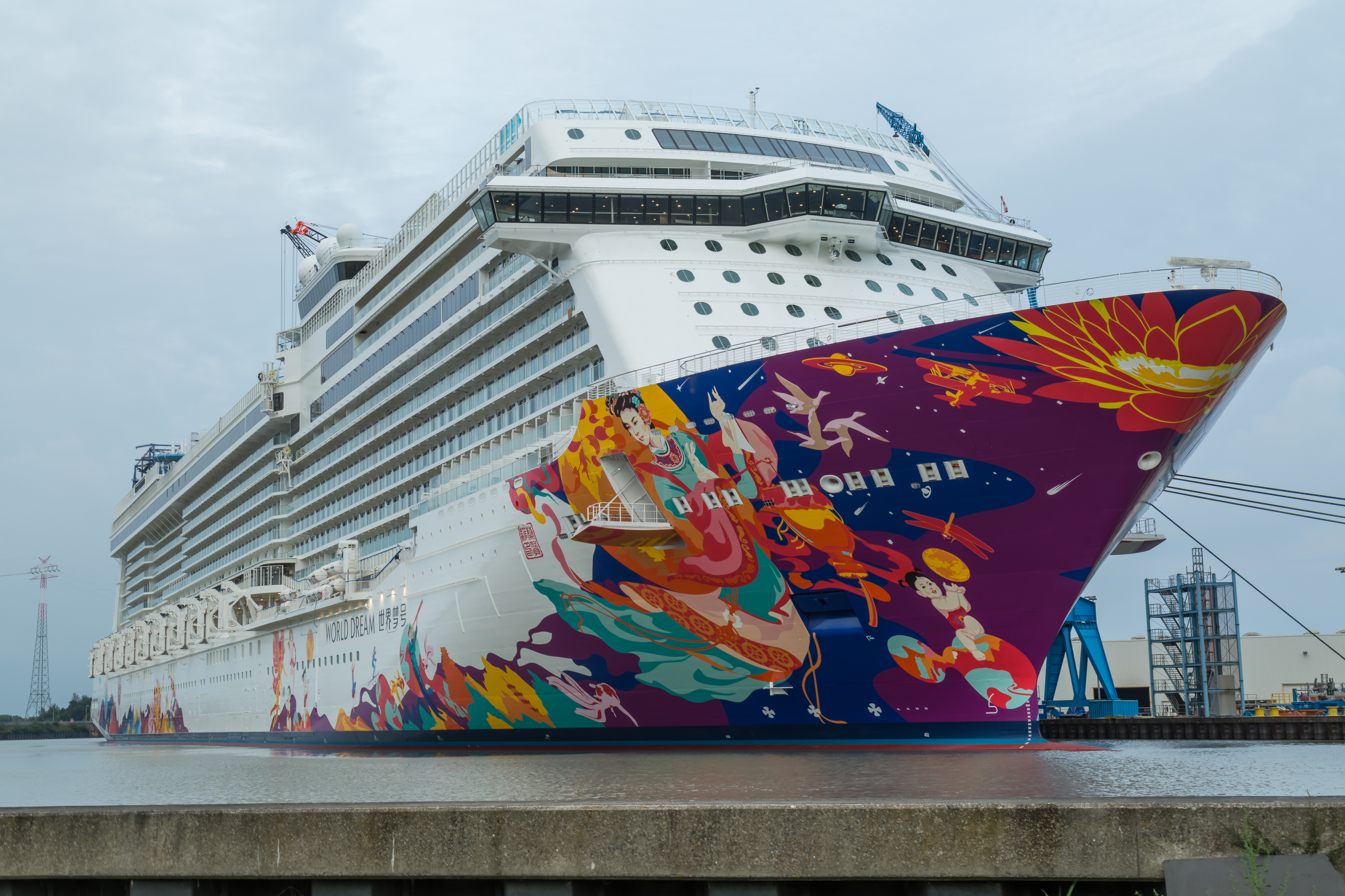 World Dream nach dem Ausdocken